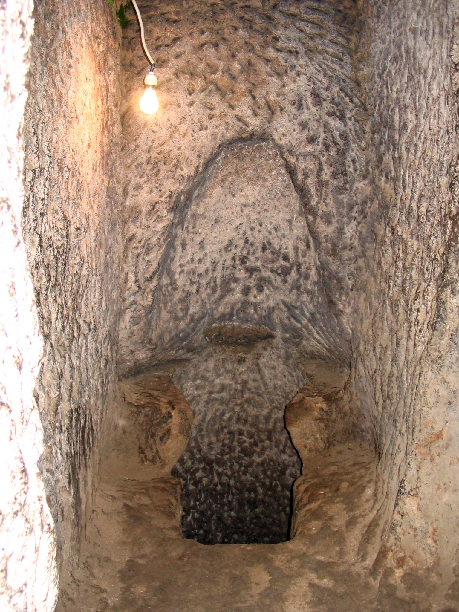 Unterirdische Toilette in Güzelyurt, Kappadokien, Zentraltürkei